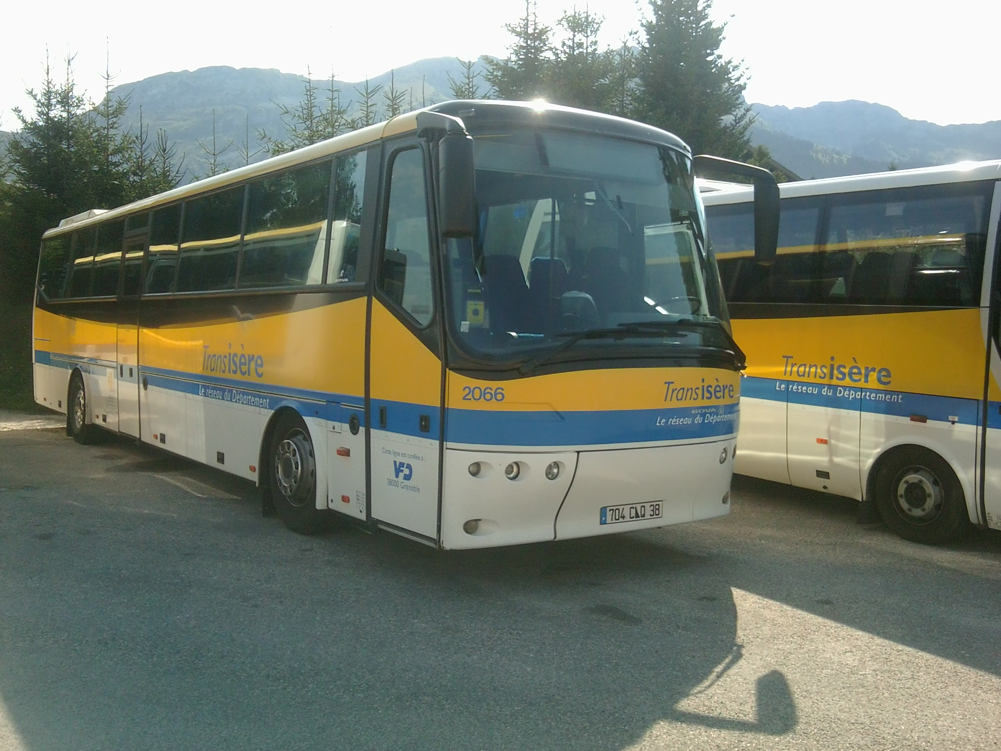 Les autocars Transisère (transporteur VFD), aux dépôt de la maison du conseil général de Villard-de-Lans.